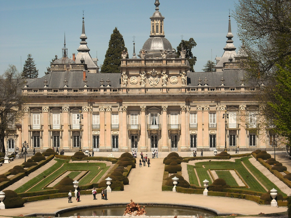 Palacio Real de la Granja de San Ildefonso (Segovia)